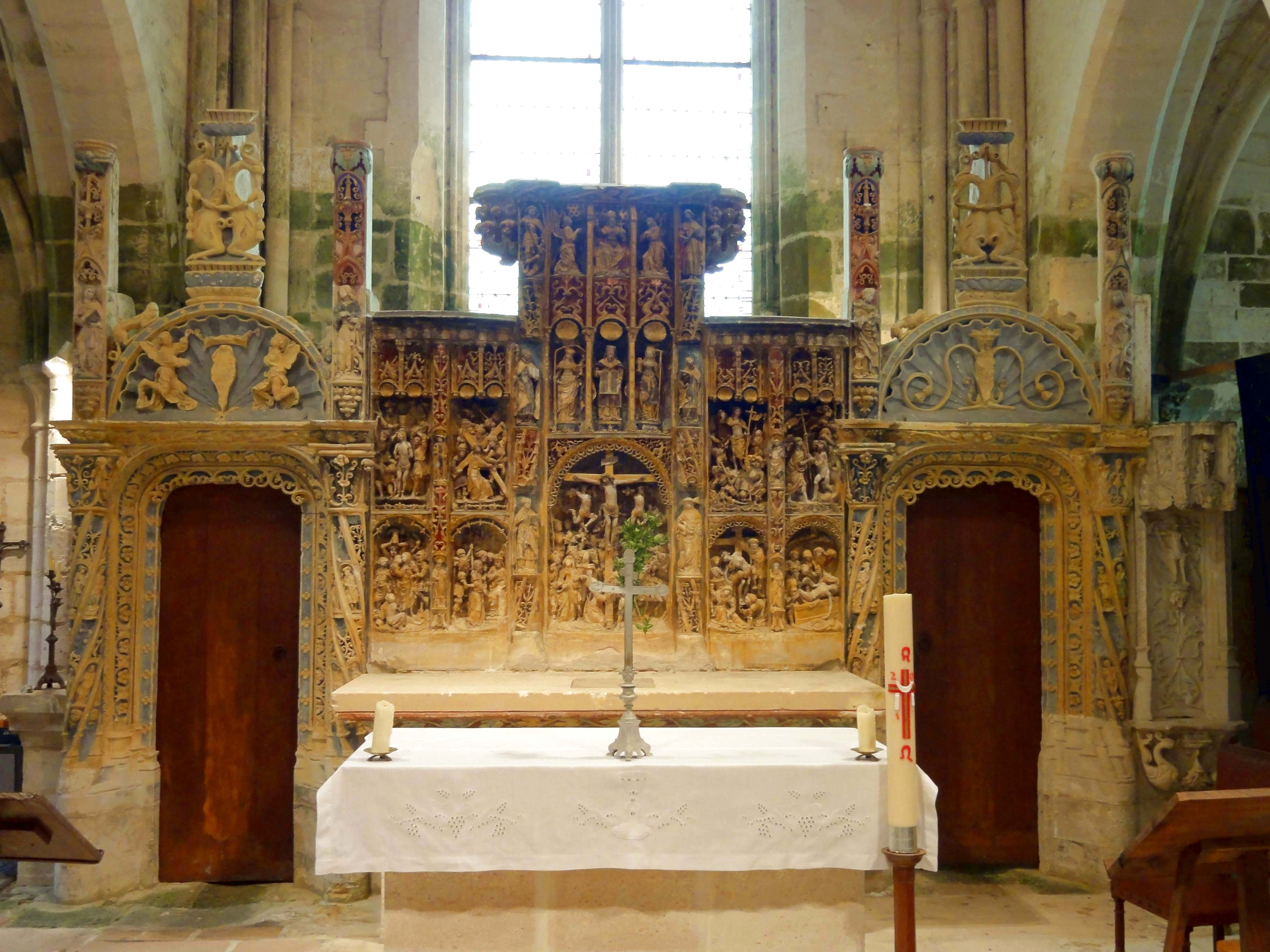 Retable de Nucourt - voir titre.